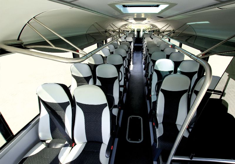 InterUrbino